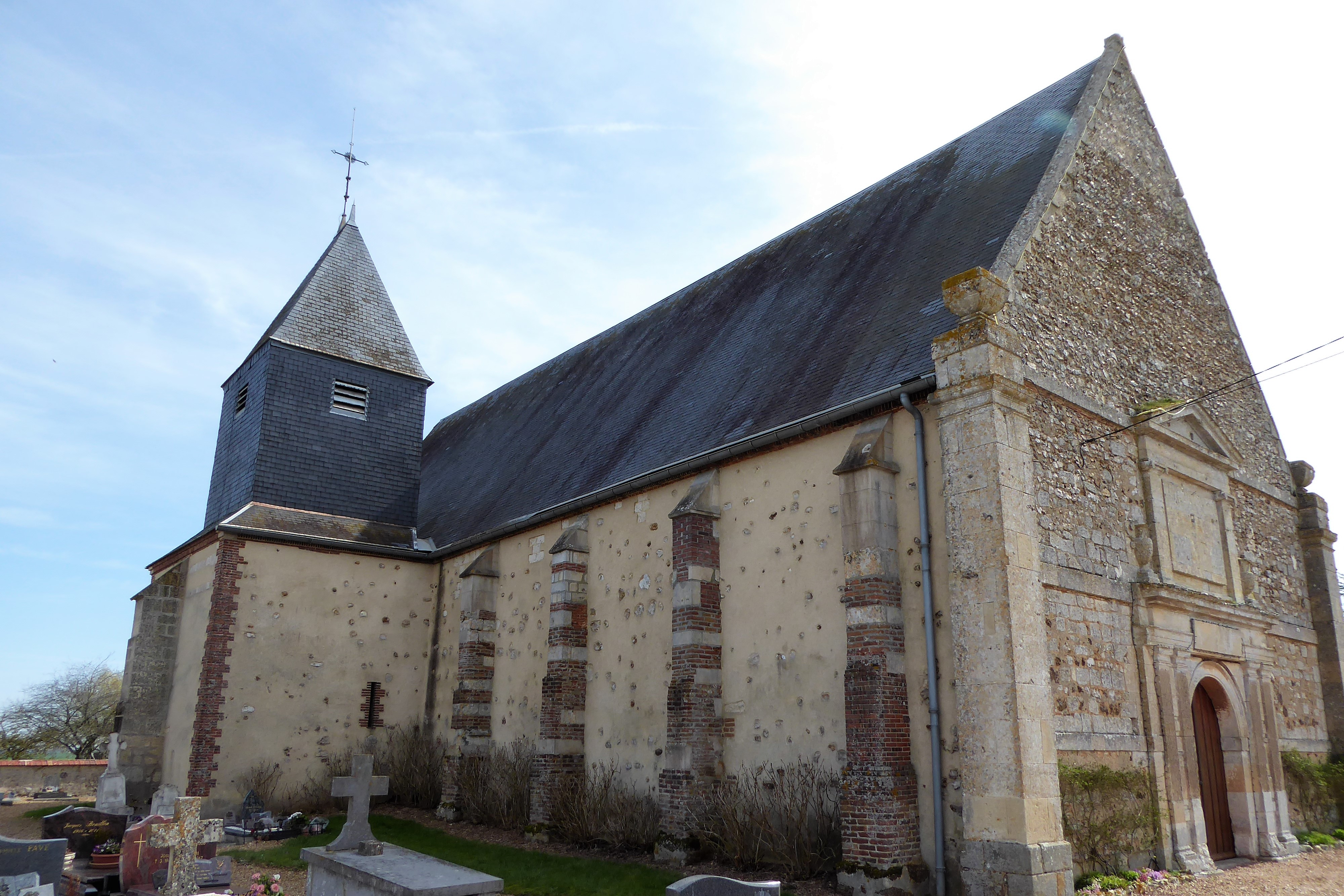 mur nord et tour-clocher de l'église Saint-Martin, Châtaincourt, Eure-et-Loir, France.